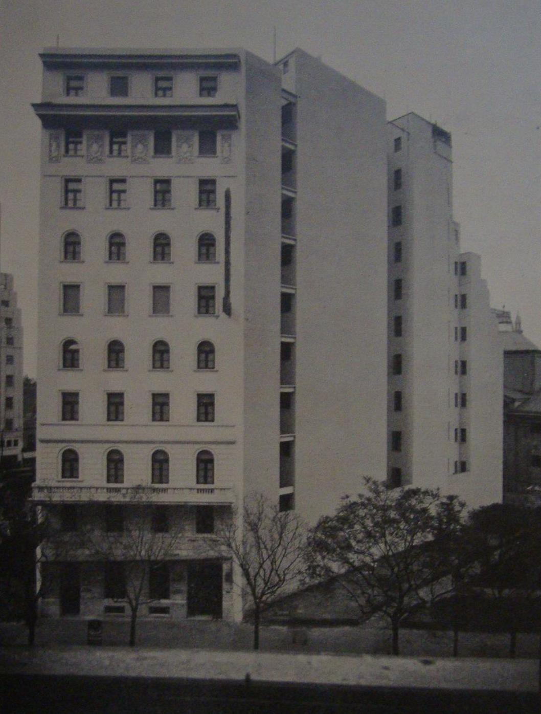 Vista desde la Diagonal Sur (Av. Pres. Julio A. Roca) del Hotel Nogaró (hoy 562 Nogaró Hotel), a su inauguración en 1931.